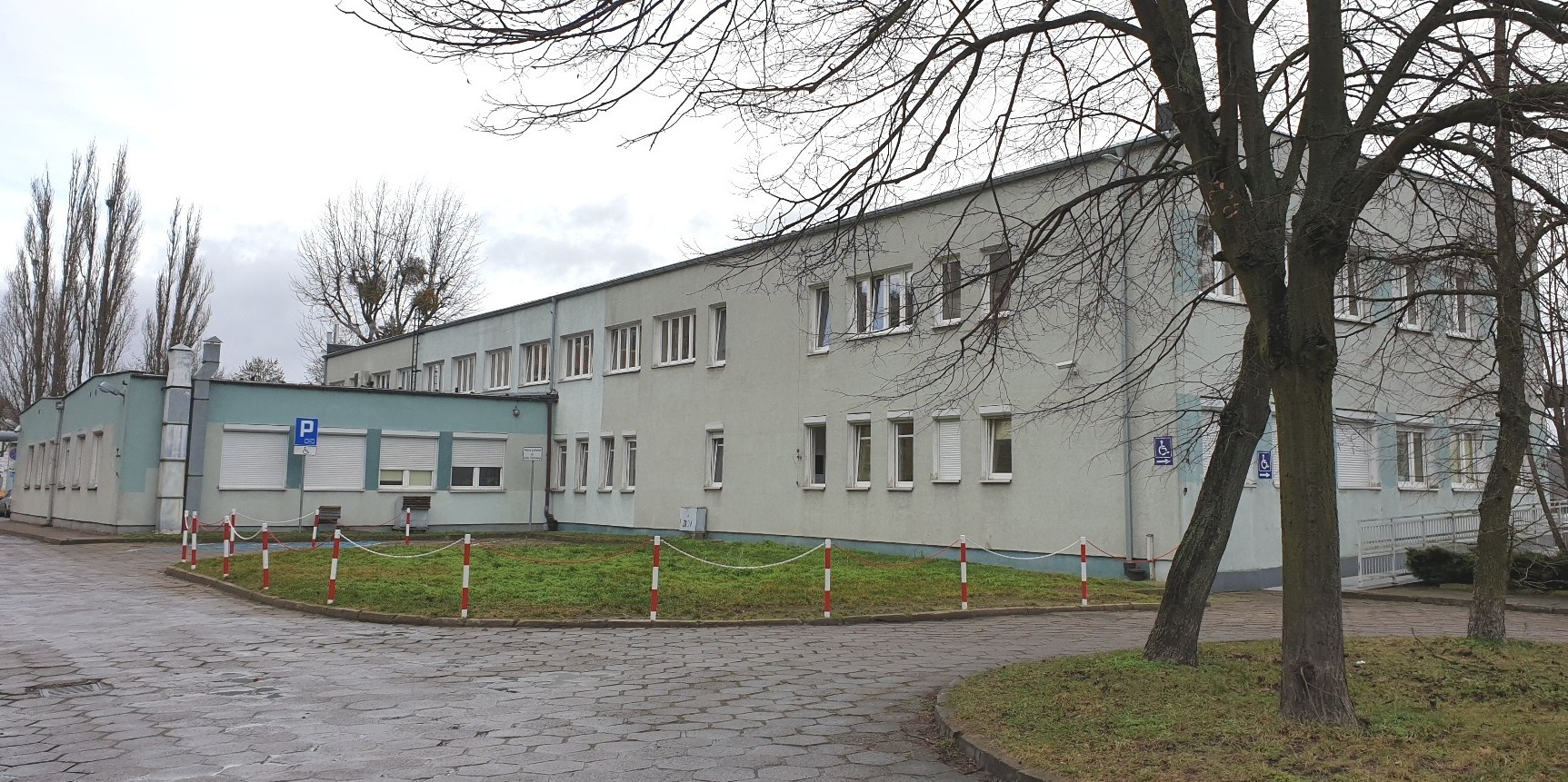 Stargard. Były ZDZ Luxpol. Stołówka, obecnie Urząd Skarbowy